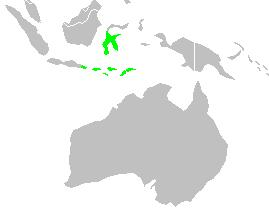 L. pallida